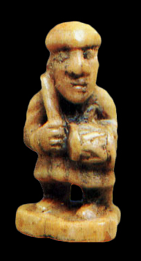 Барабаншчык з Ваўкавыска